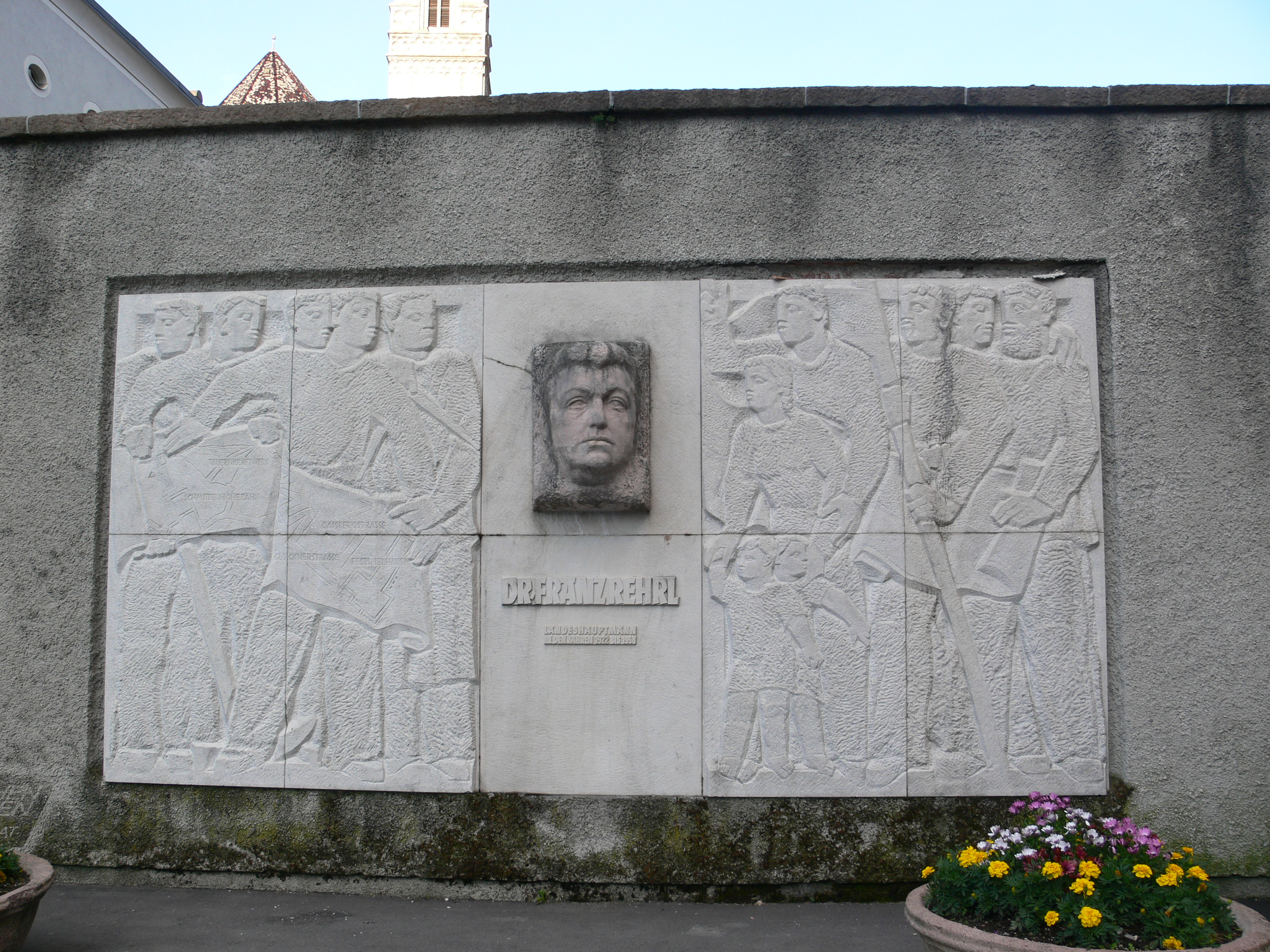 Salzburg, Denkmal für Landeshauptmann Franz Rehrl am Max-Reinhardt-Platz, geschaffen 1958 von Jakob Adlhart und Hans Pacher